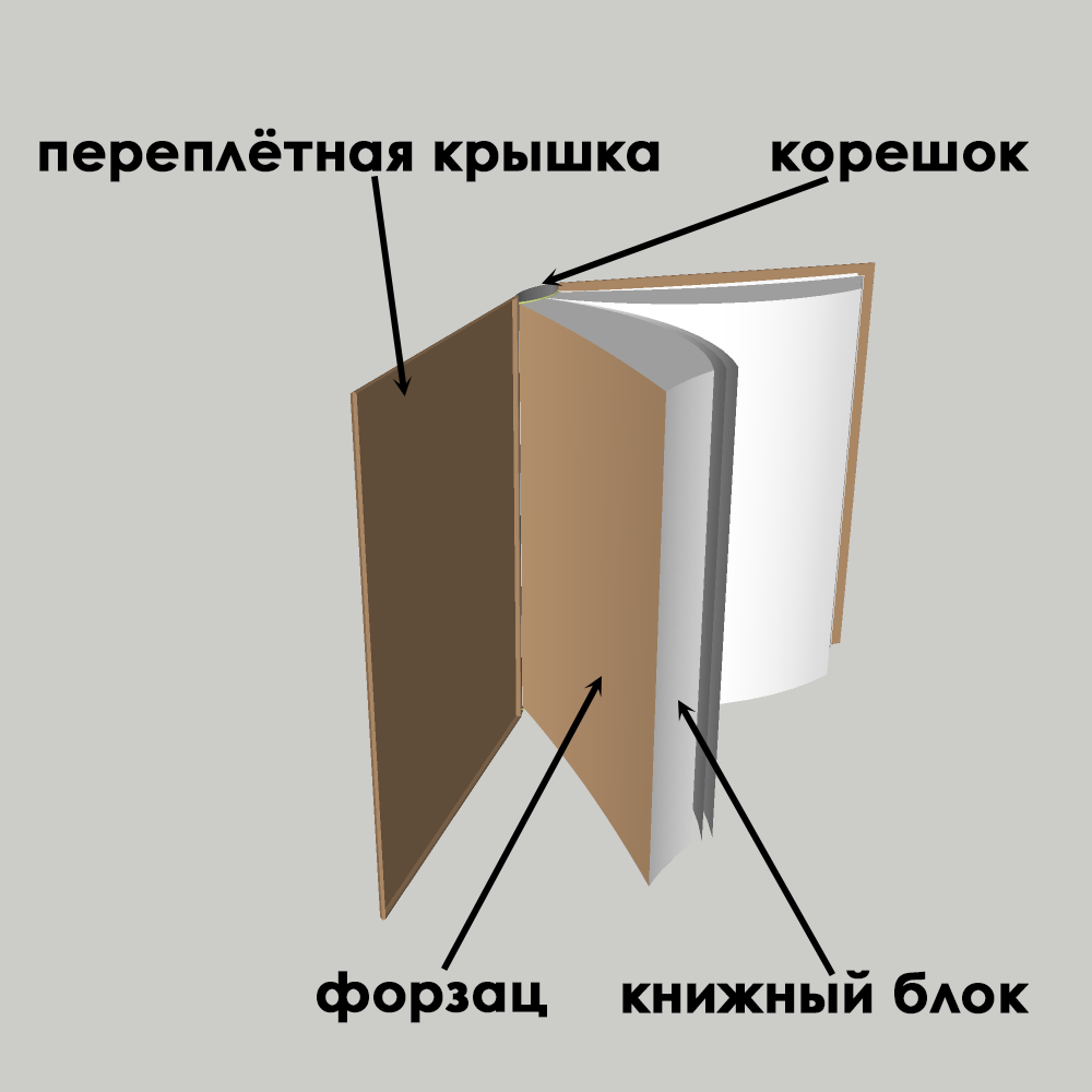 из чего состоит переплёт книги (кратко)